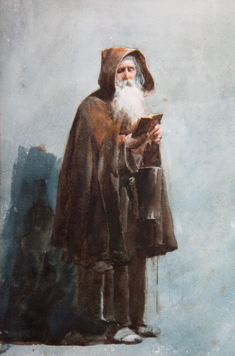 Obra de Josep Tapiró i Baró del període a Roma